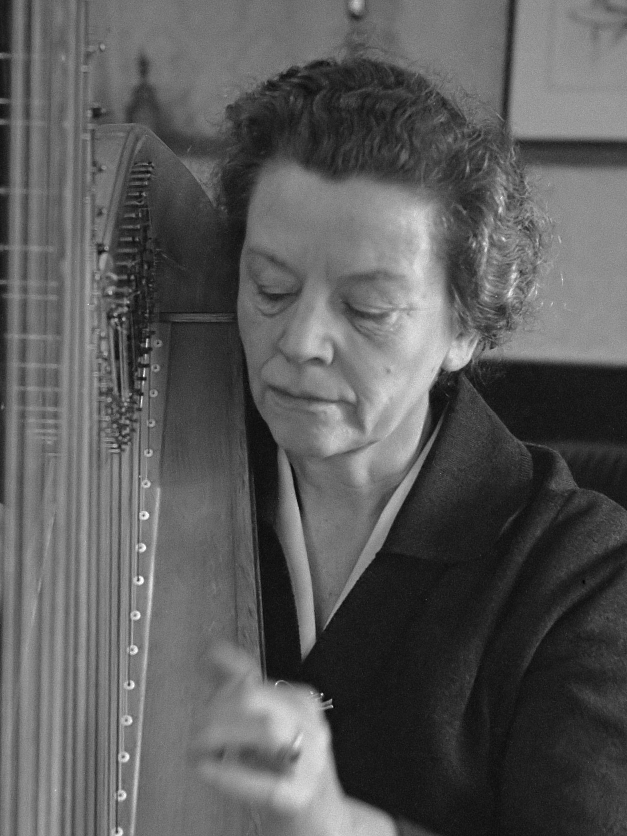 Internationale studieweek in Toonkunstenaarscentrum "Eduard van Beinum" te Breukelen gewijd aan de barokmuziek Phia Berghout (harpiste) 10 januari 1964